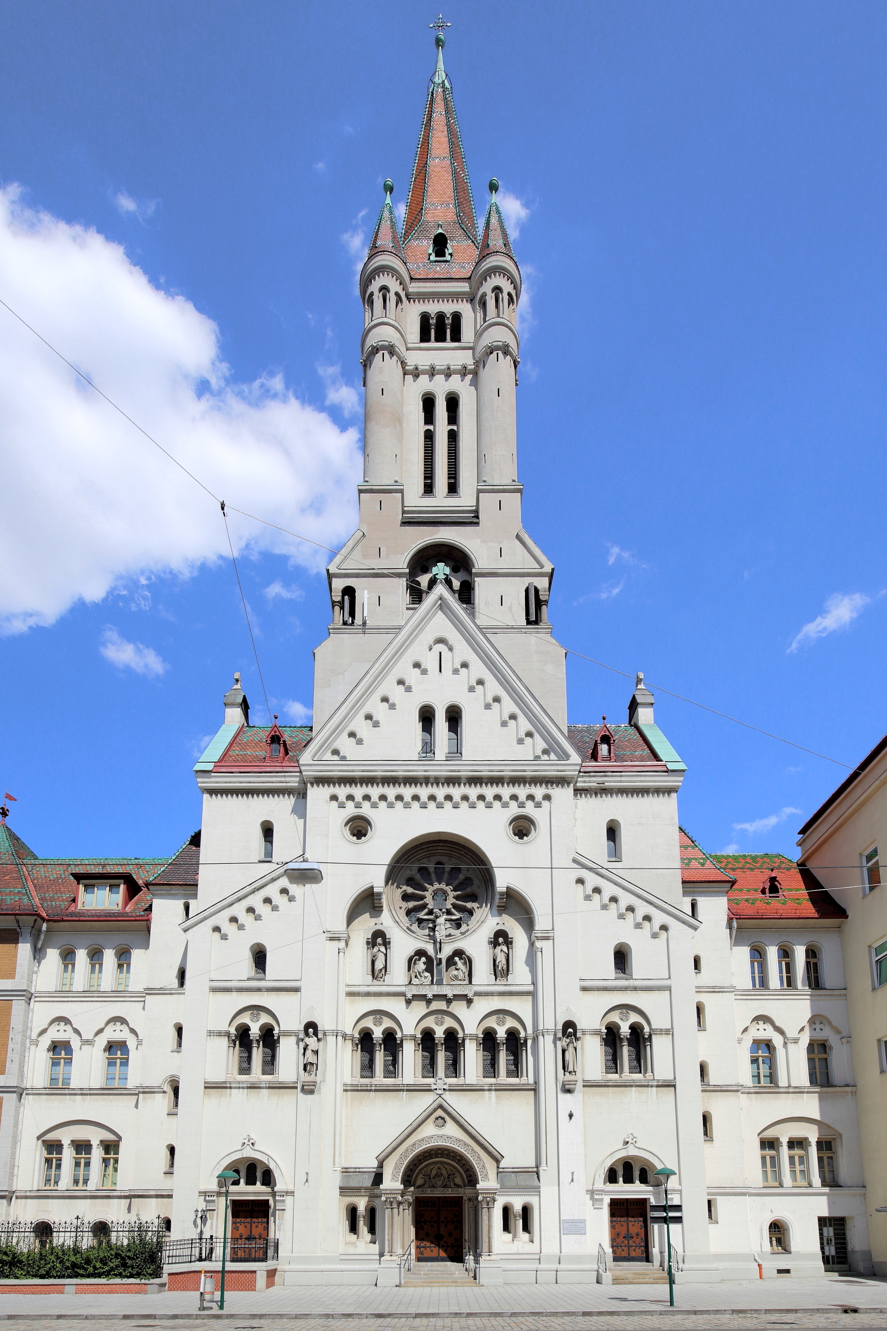 Die Herz-Jesu-Kirche im 3. Wiener Gemeindebezirk Landstraße. Die Kirche wurde von 1904 bis 1906 nach Plänen des Architekten Gustav von Neumann errichtet.